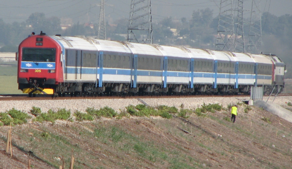 קרונות מודו חד קומתיים מתוצרת אלסטום